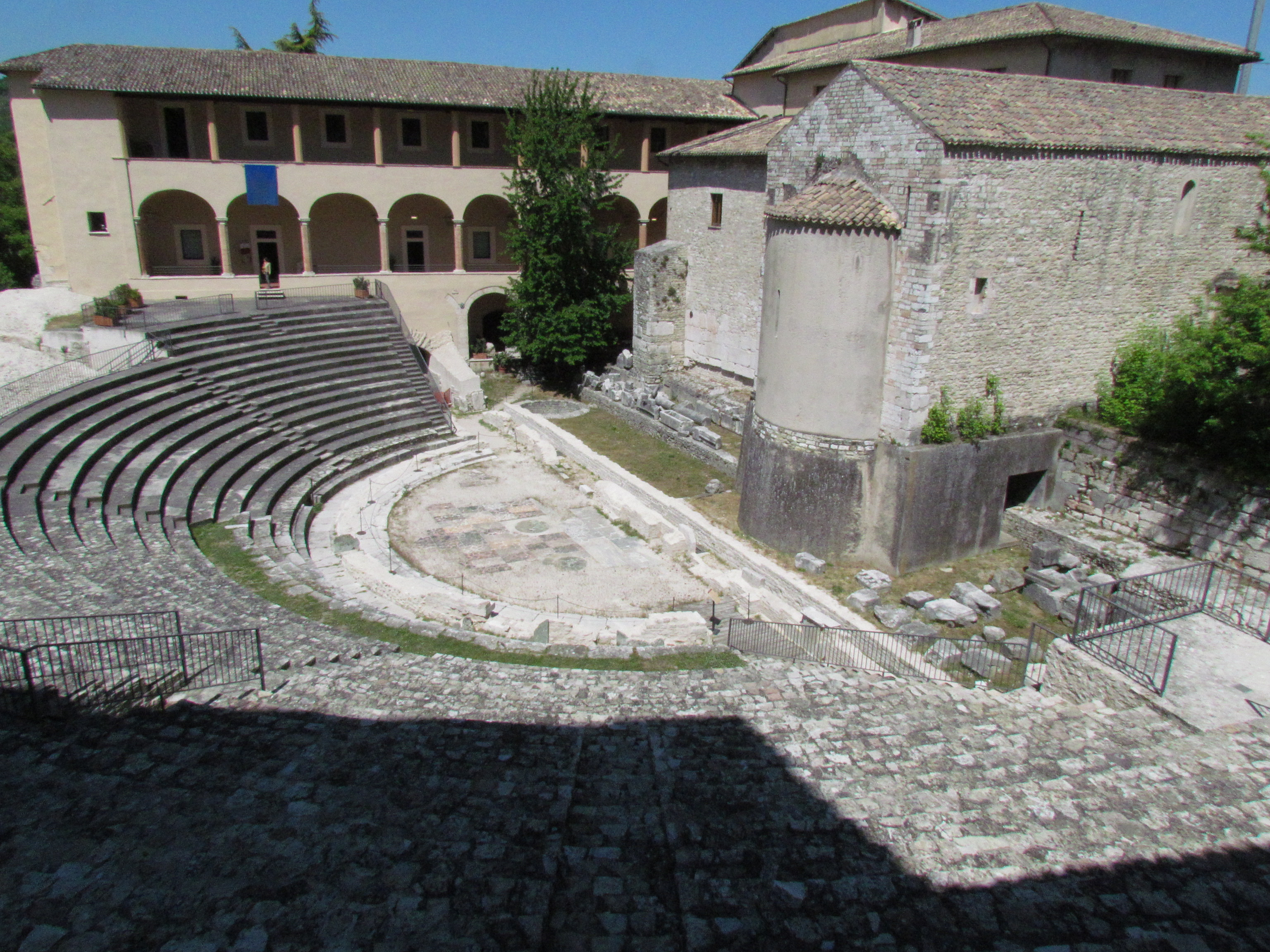 Teatro Romano di Spoleto. Sulla destra retro della chiesa di Sant'Agata con abside. In fondo il chiostro a nove arcate del monastero di Sant'Agata. This is a photo of a monument which is part of cultural heritage of Italy.